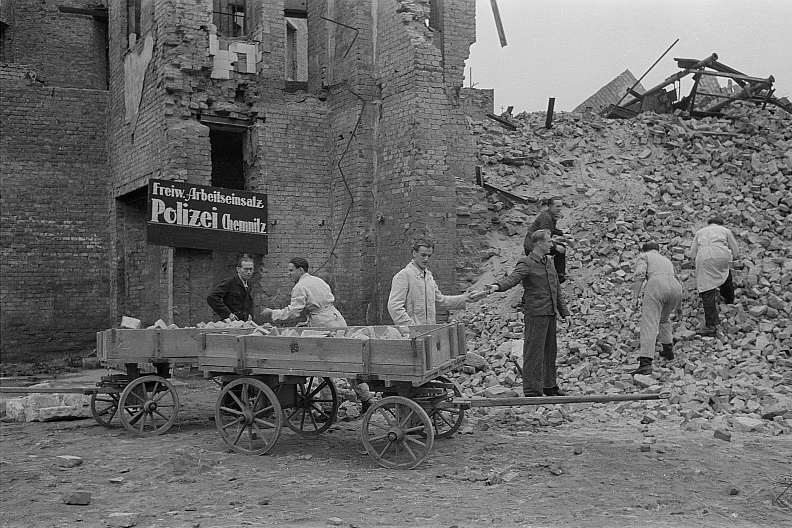 Original image description from the Deutsche FotothekFreiwilliger Arbeitseinsatz der Polizei zur Enttrümmerung. Polizisten beladen Kastenwagen mit wiederverwendbaren Ziegeln